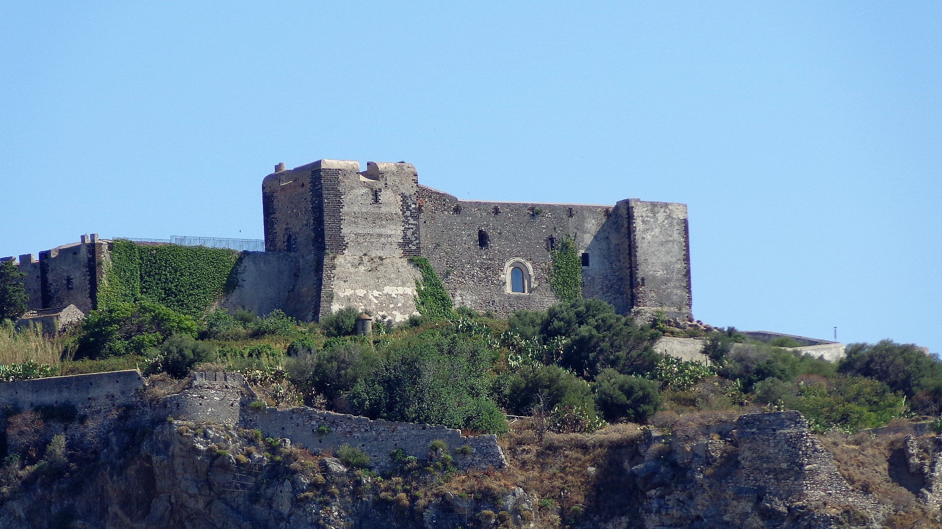 castello di Milazzo This is a photo of a monument which is part of cultural heritage of Italy.